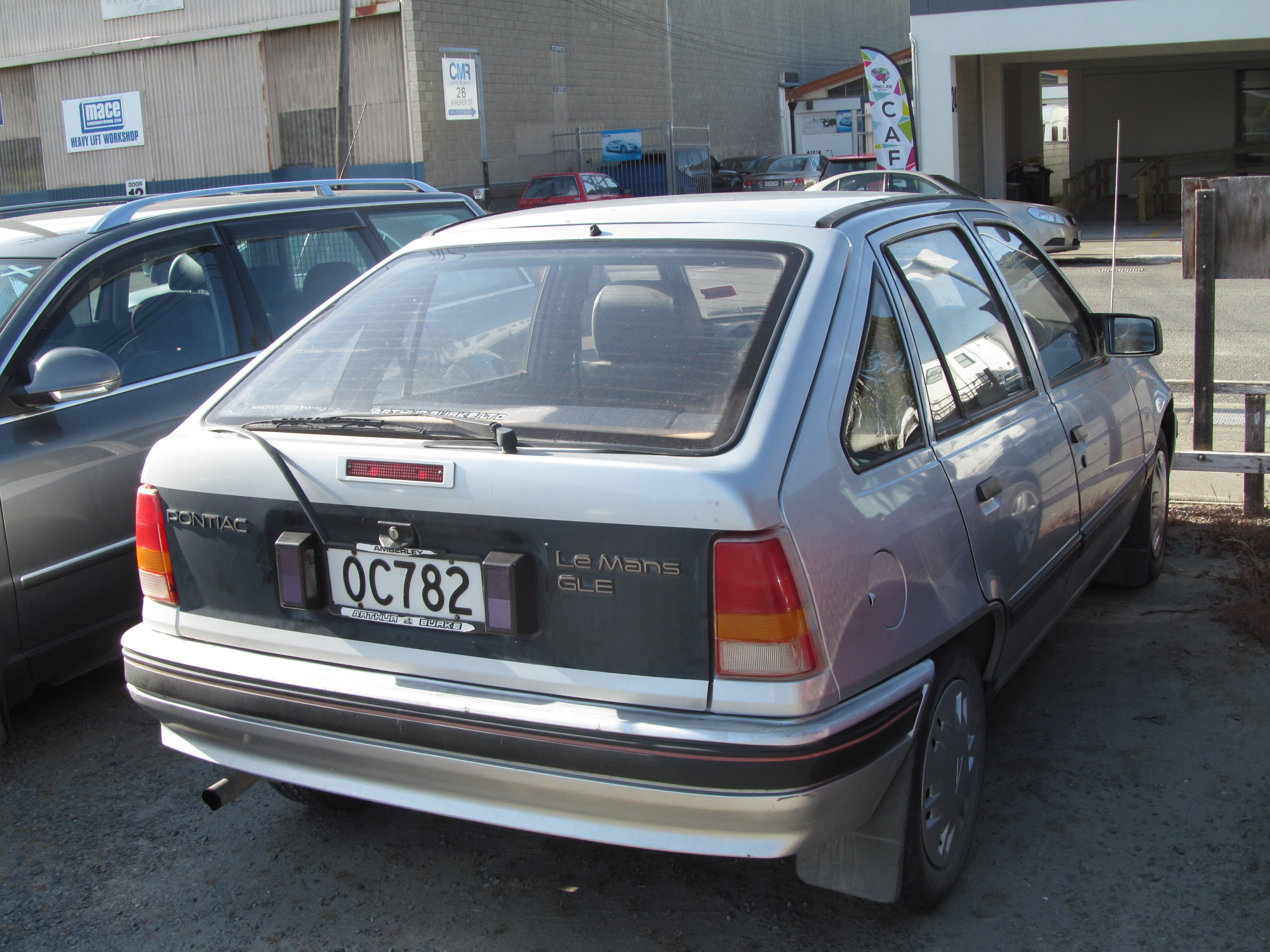 1989 Pontiac Le Mans GLE